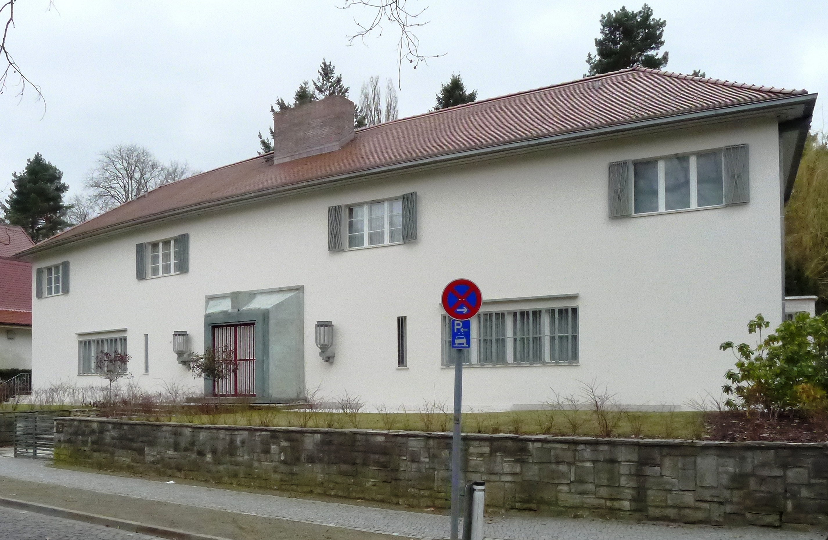 Landhaus